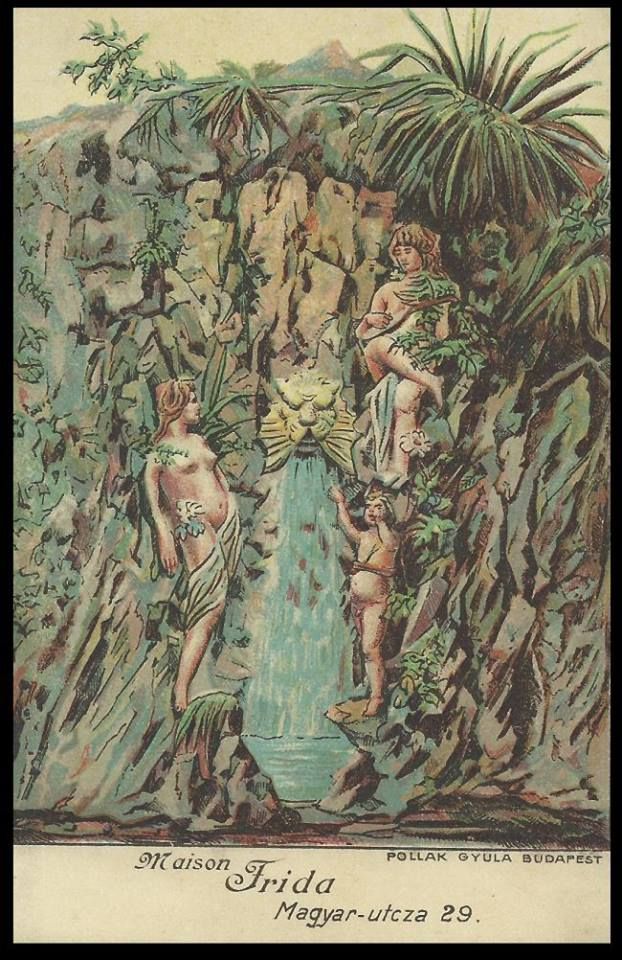 Régi levelezőlap; reklám